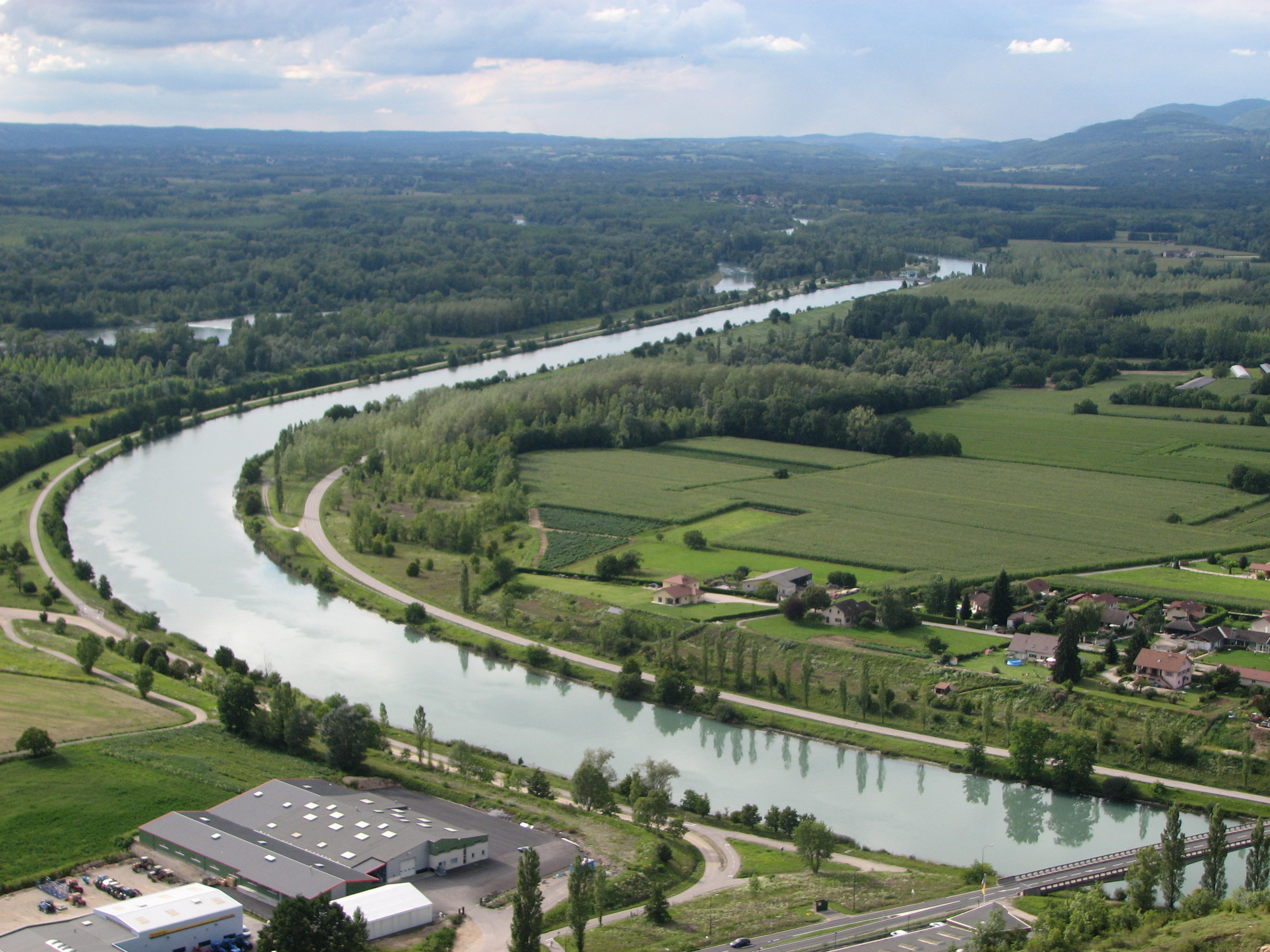 Canal de dérivation de Brégnier-Cordon (Ain). Photo prise du sommet du mont de Cordon.